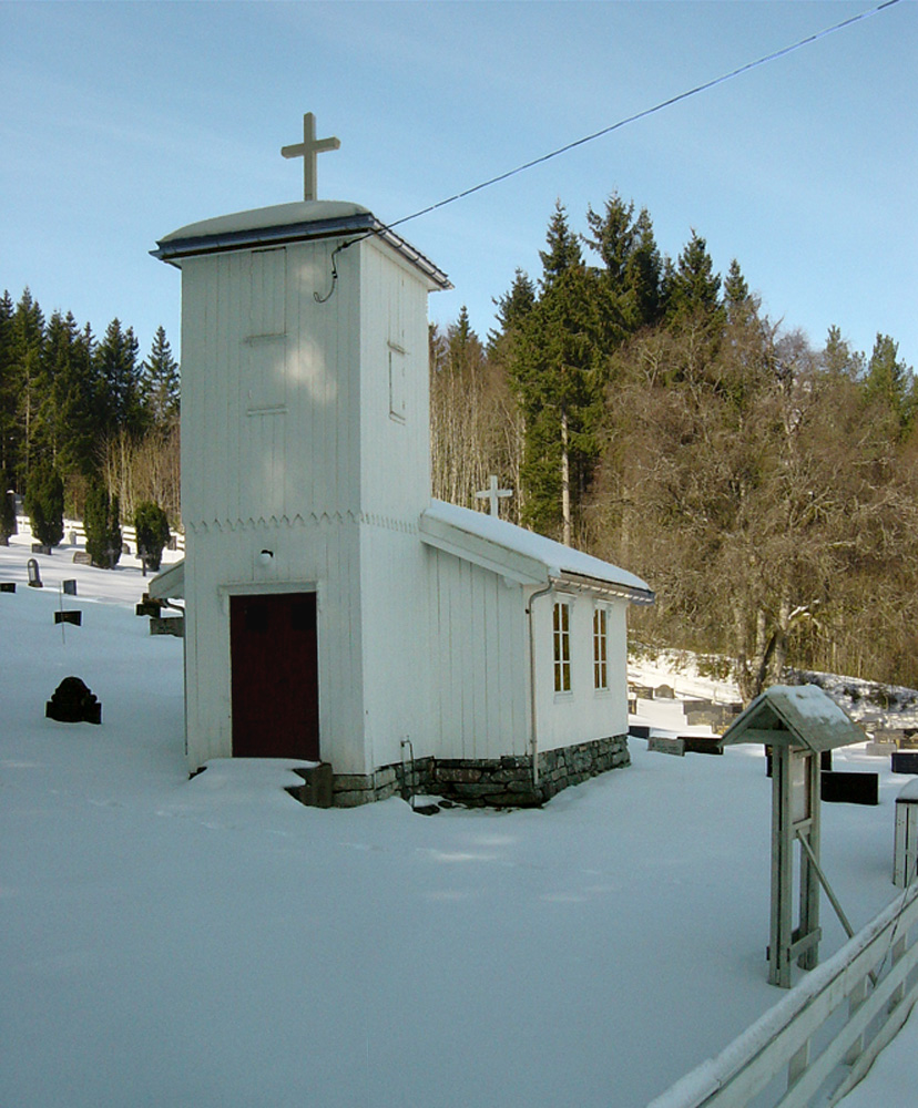 Gjemnes and the Flemma kirkegård